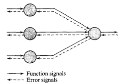 Retropopagação perceptron